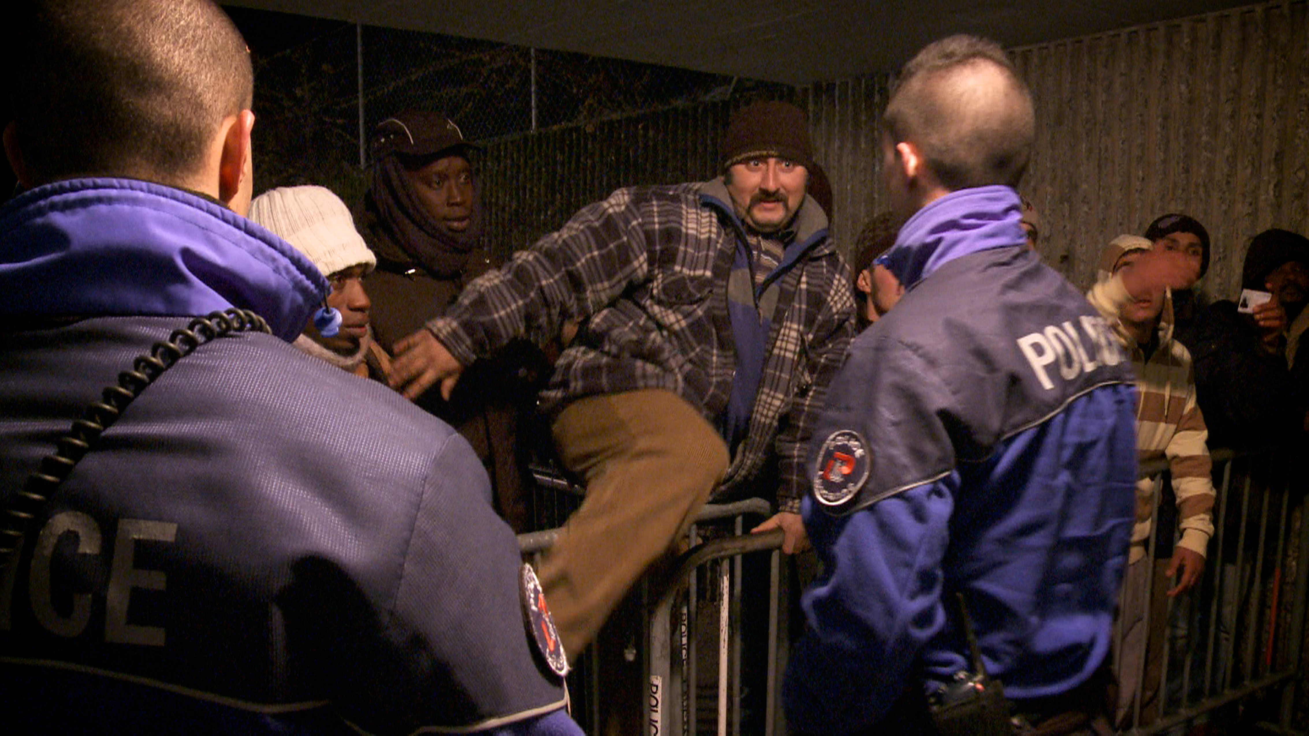 Un sans-abritente un passage devant les policer. Image tirée du film « L’abri » de Fernand Melgar